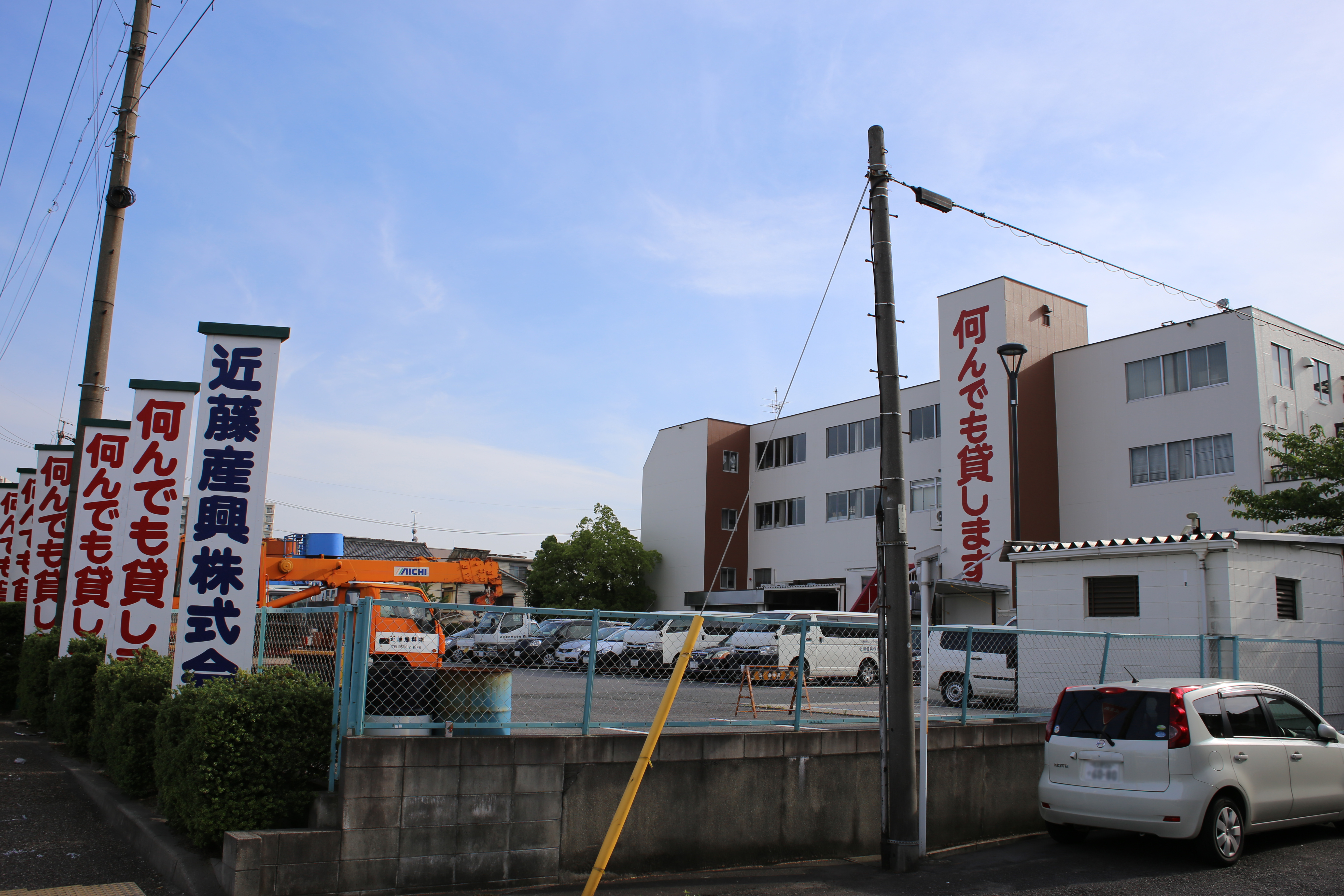 名古屋市南区浜田町の近藤産興本社を東側公道北側より撮影。ただし、ナンバープレートにつき画像処理済み。